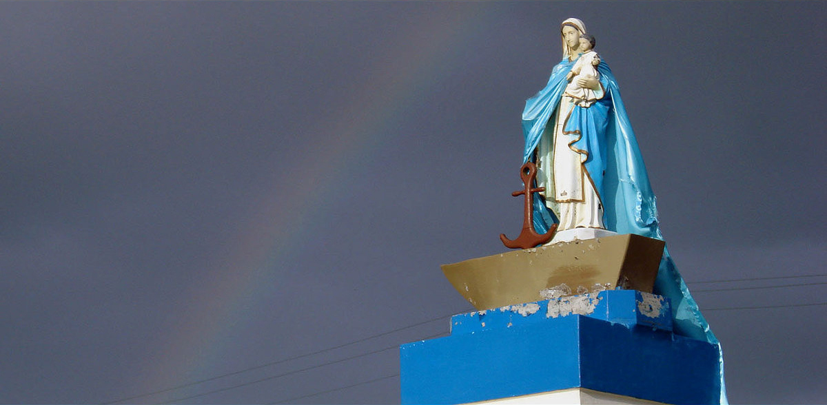 N.S. dos Navegantes em Torres